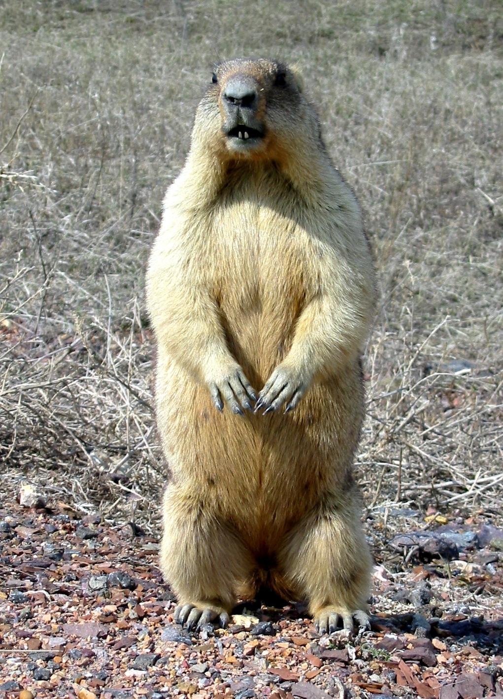 bobak marmot